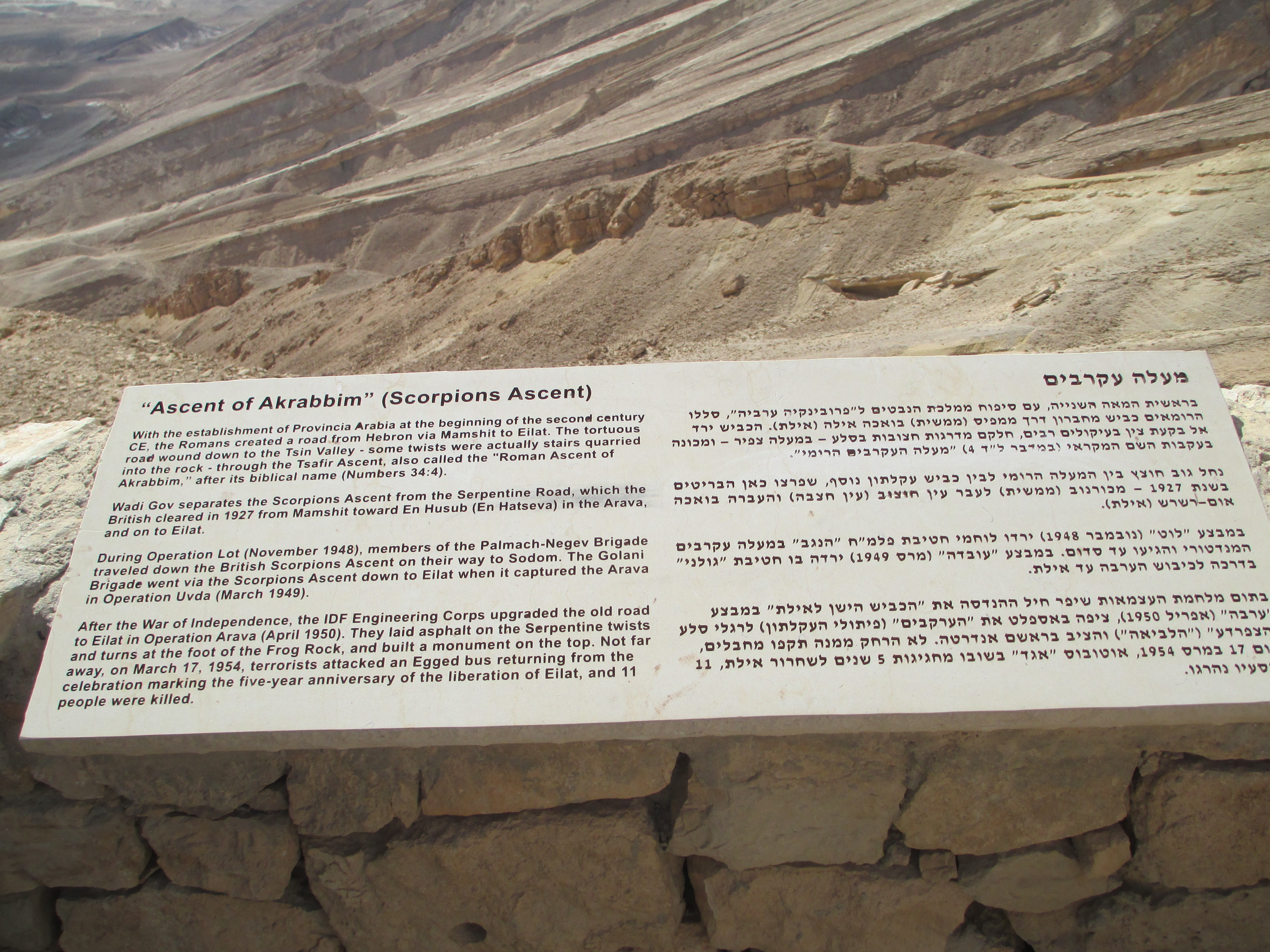 שלט הנצחה במצפה מעלה עקרבים